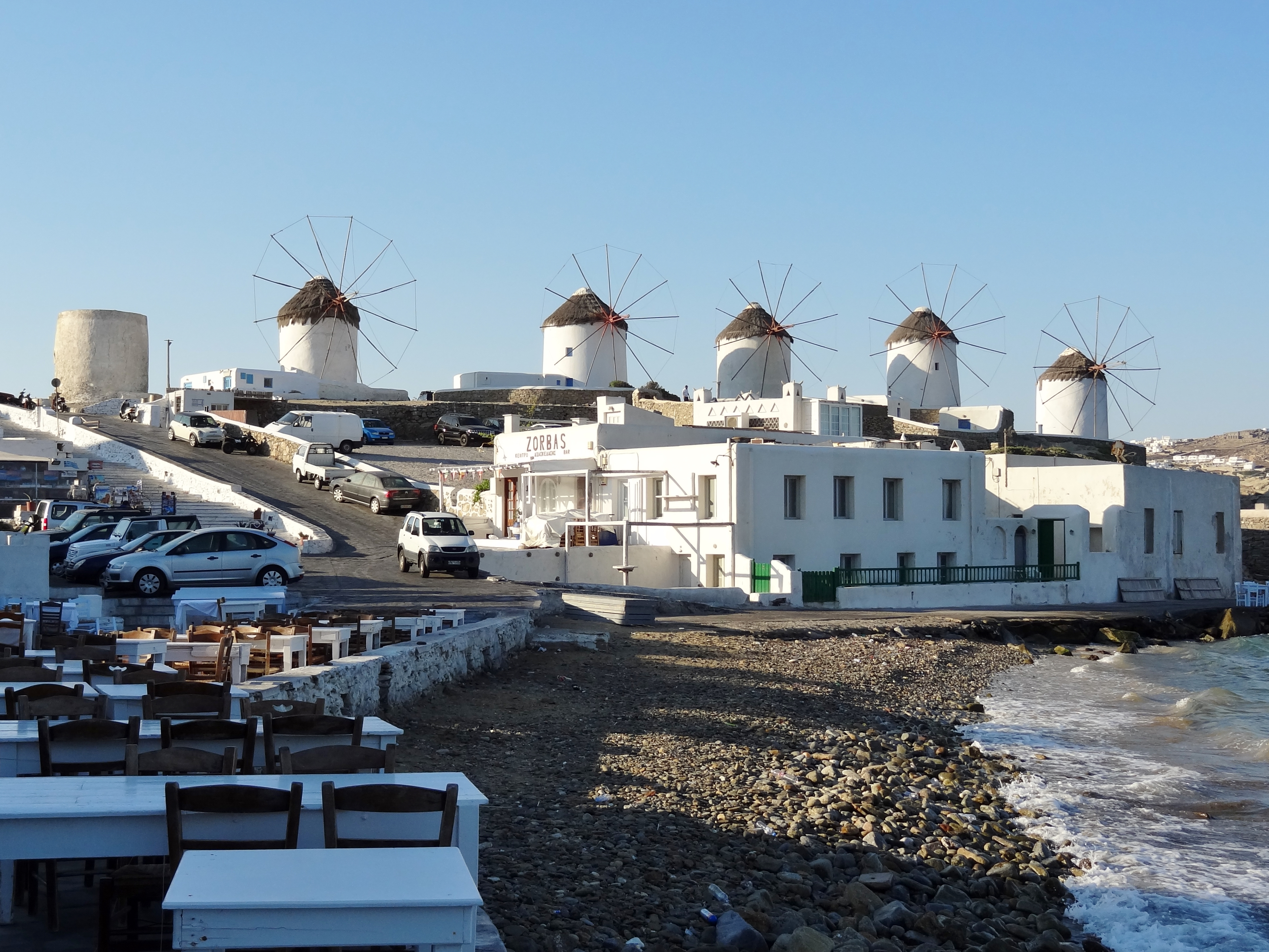 Windmühlen in Chora auf Mykonos, Kykladen, Griechenland